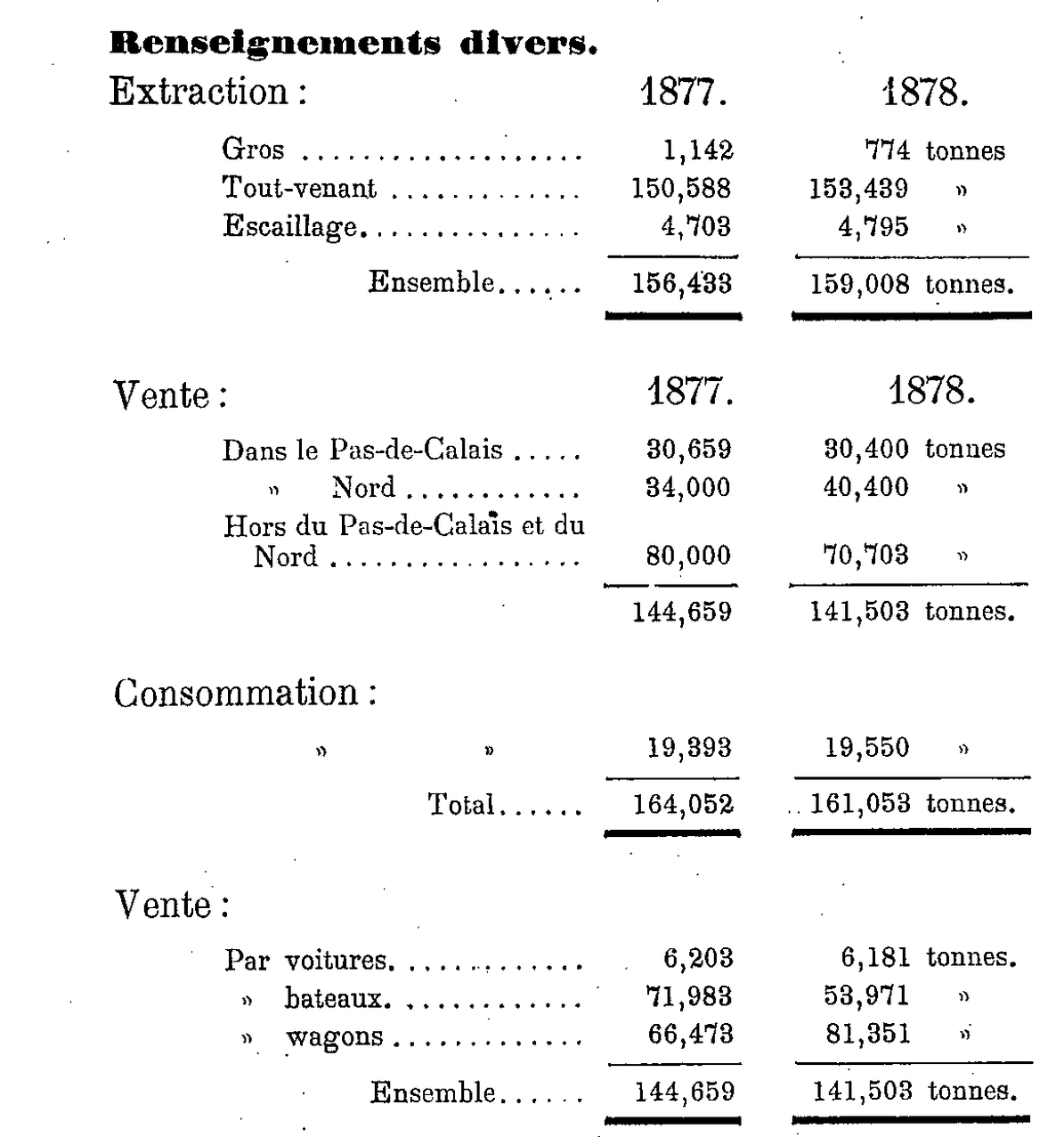 Renseignements divers à propos de la Compagnie des mines de Ferfay.